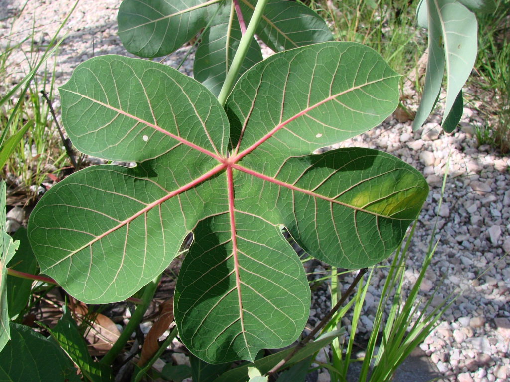 Manihot quinqueloba - EUPHORBIACEAE Parque Nacional da Chapada dos Veadeiros - Povoado São Jorge - Alto Paraíso de Goiás - Goiás - Brasil.